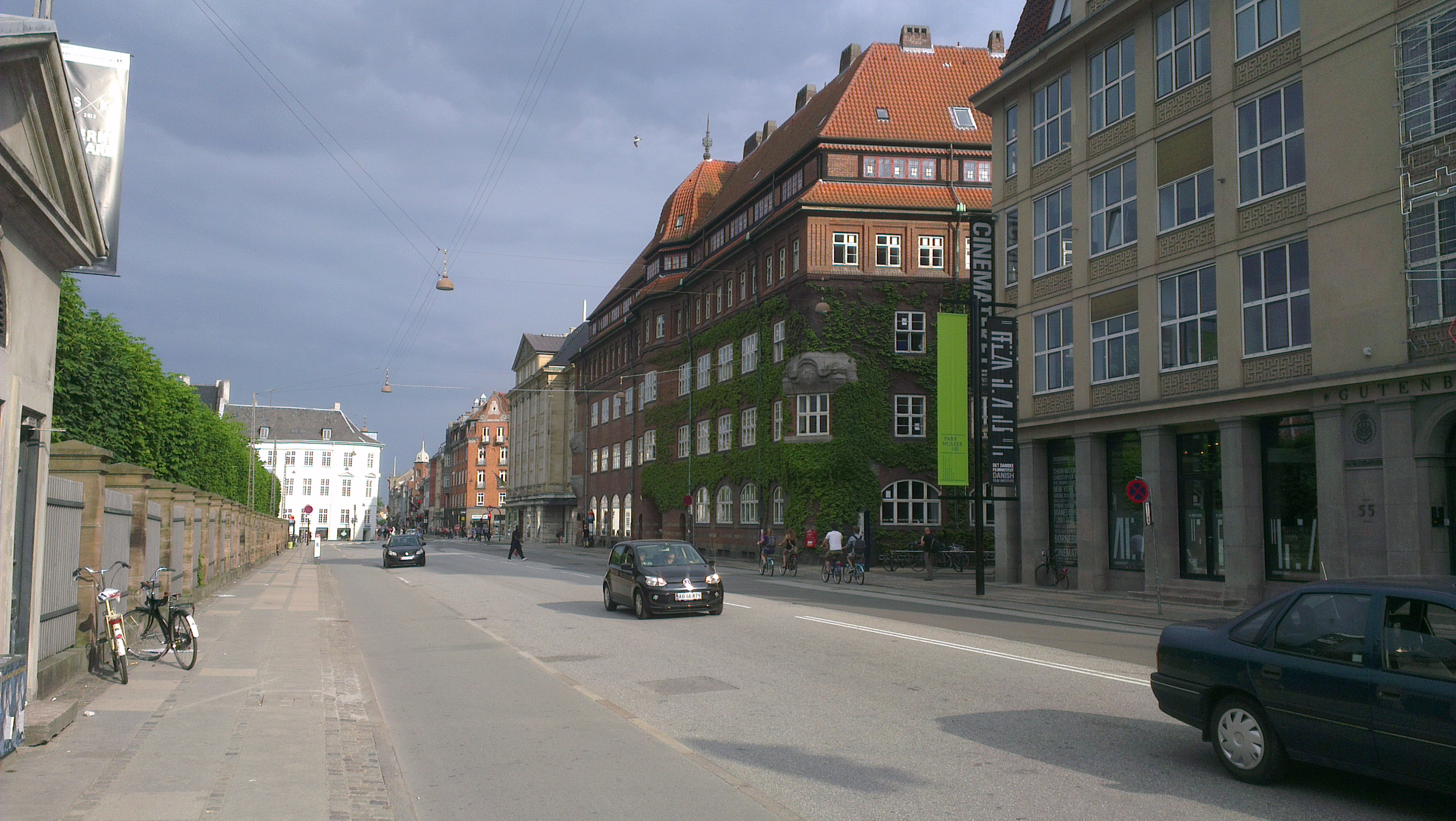 Gothersgade in Copenhagen, Denmark